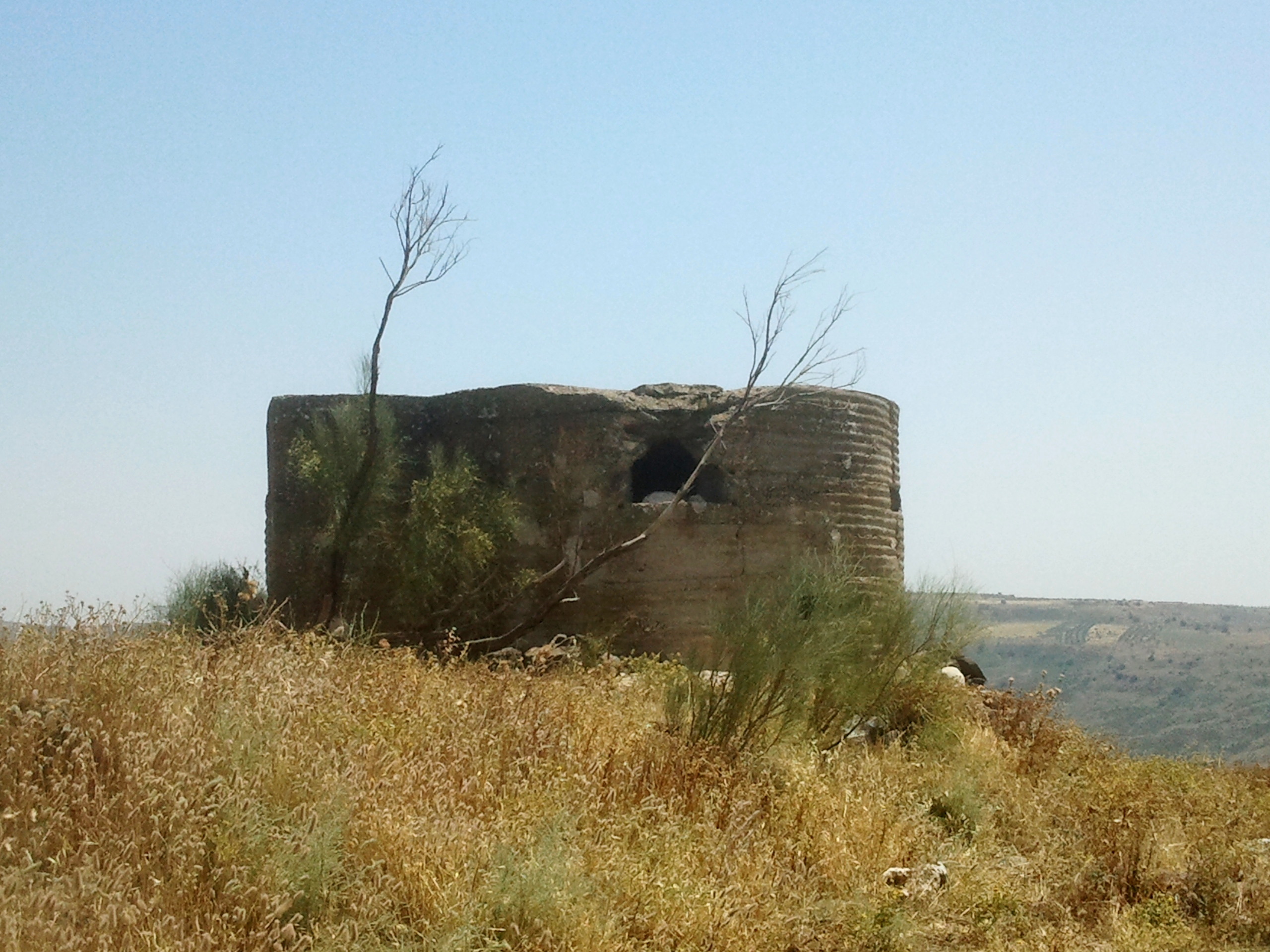 פילבוקס שהוקם על ידי הבריטים בשנת 1941 הצופה אל עמק הירדן. הוא נבנה כחלק ממאמציהם לסקל פלישה של כוחות צרפתיים מצפון.